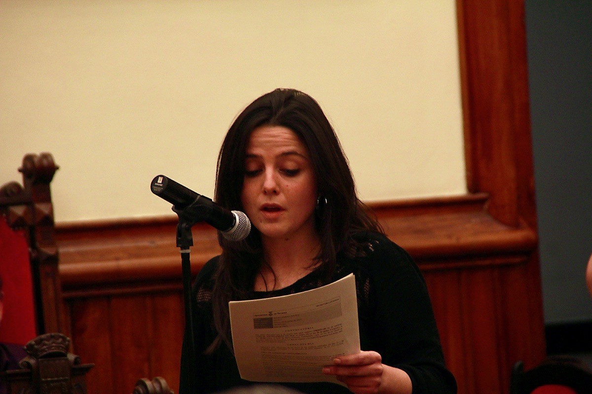 Maria Sirvent Escrig, intervenint com a regidora de la CUP al ple del gener del 2017 de l'Ajuntament de Terrassa.